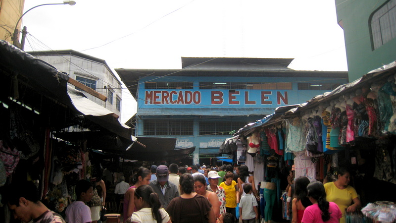 Mercado de Belén, ubicado en el distrito de Belén, Iquitos.